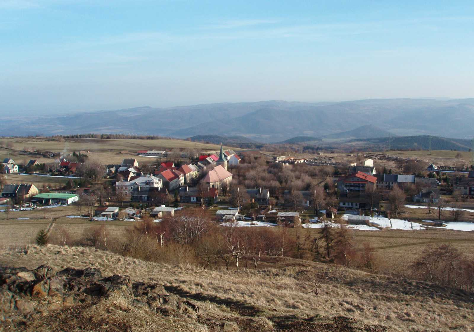 Pohled na Měděnec z vrcholu Mědníku, Krušné hory